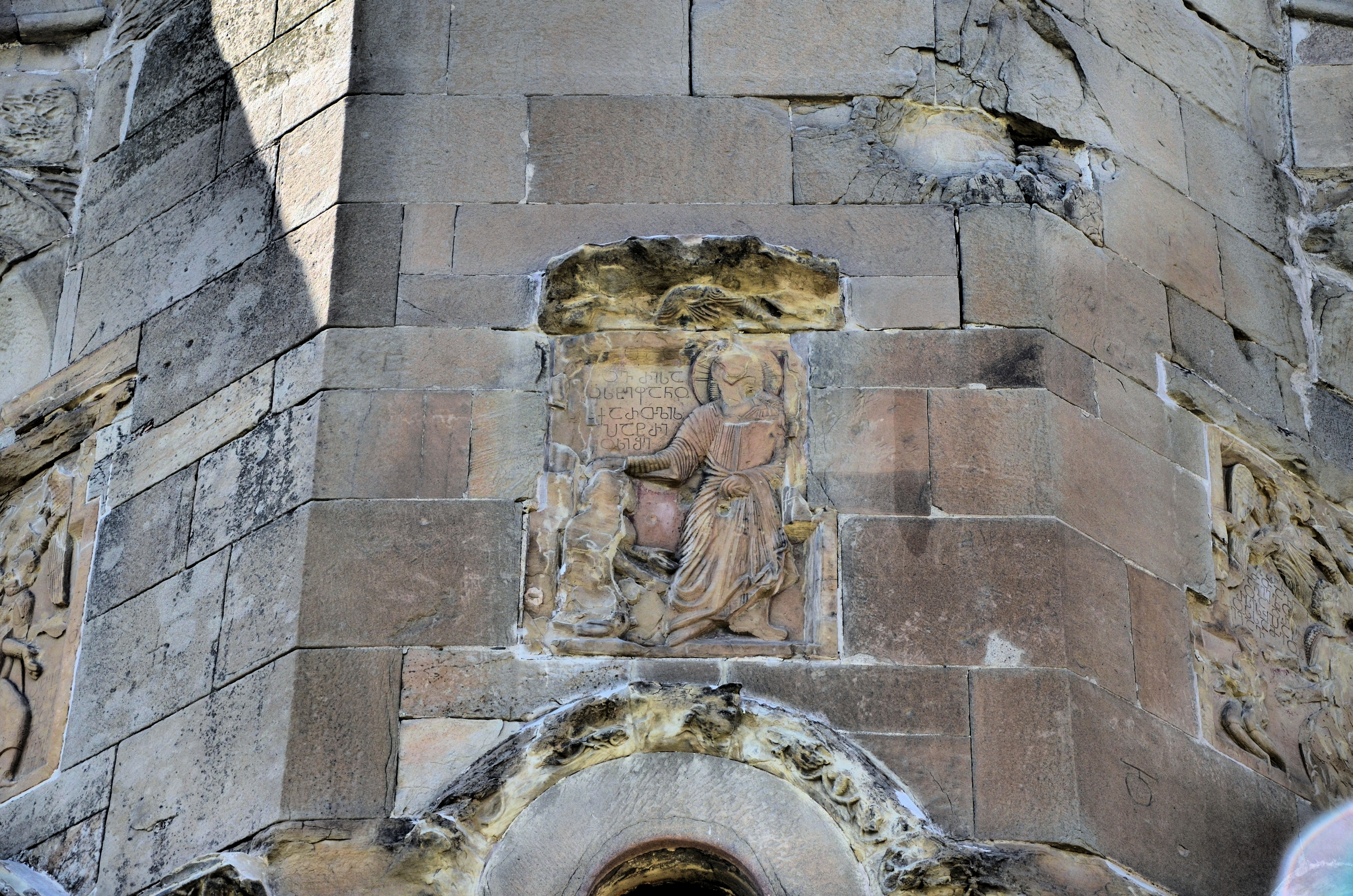 Jvari, Georgia